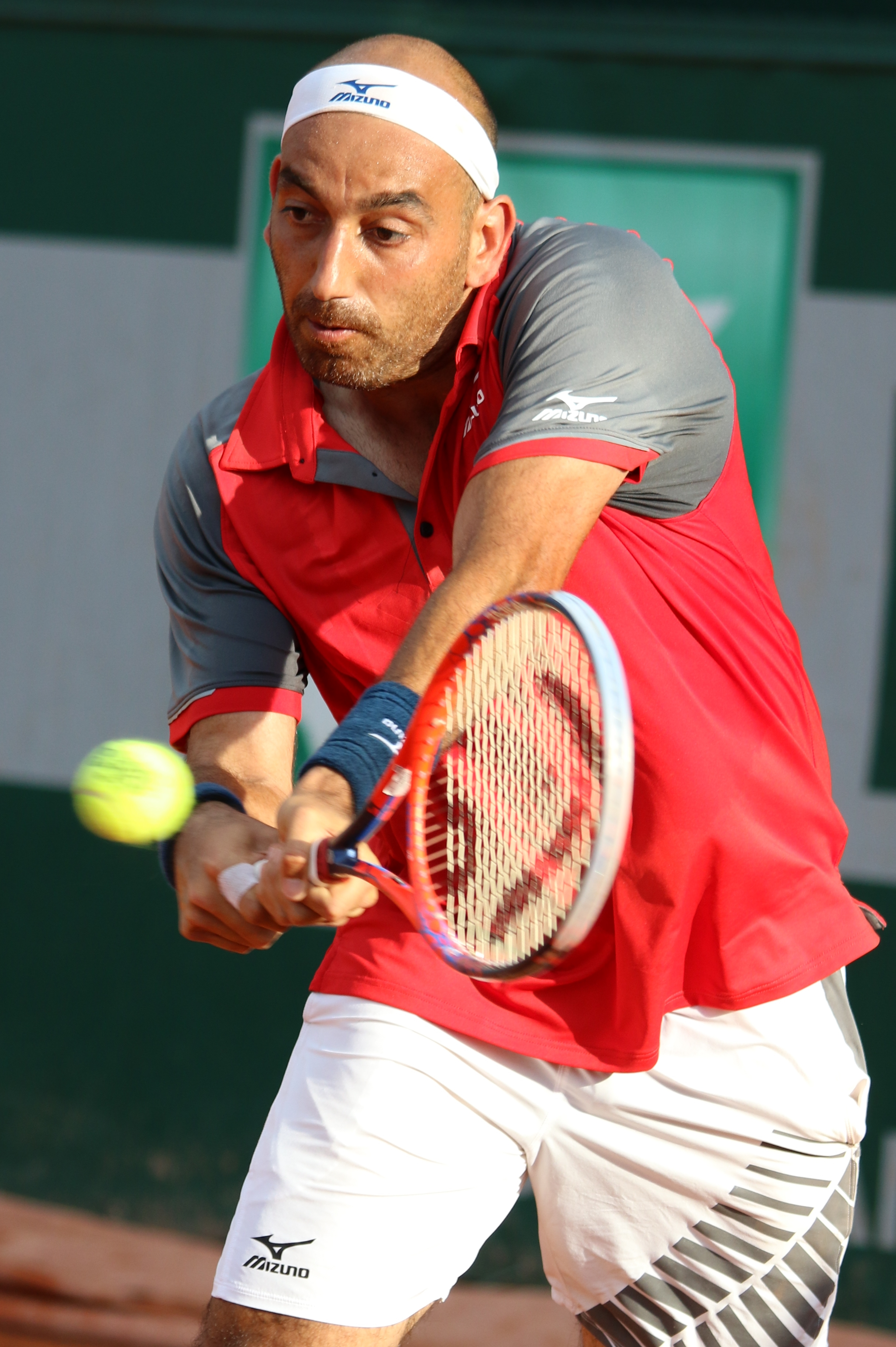 Raja RG18 (4)